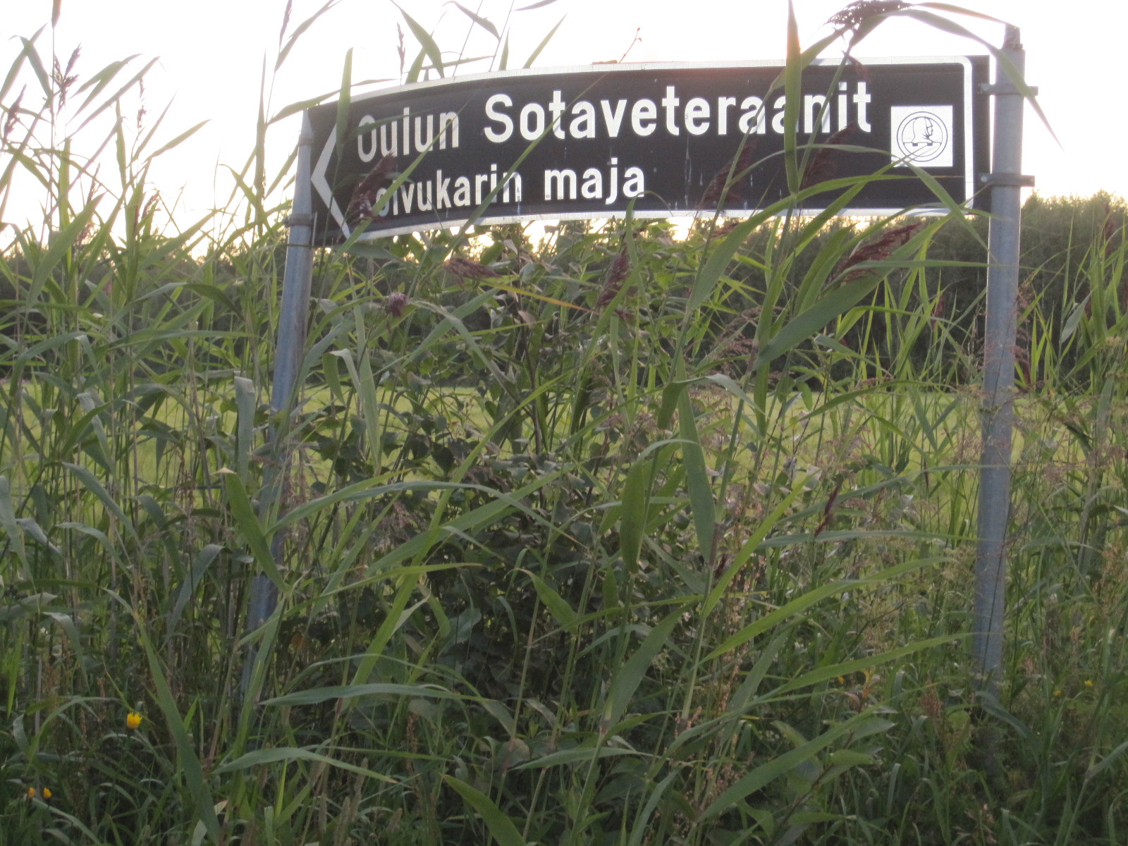 Viitta Oulun sotaveteraanien Koivukarin majalle Oulunsalon Letossa, Letontien ja Koivukarintien risteyksessä.